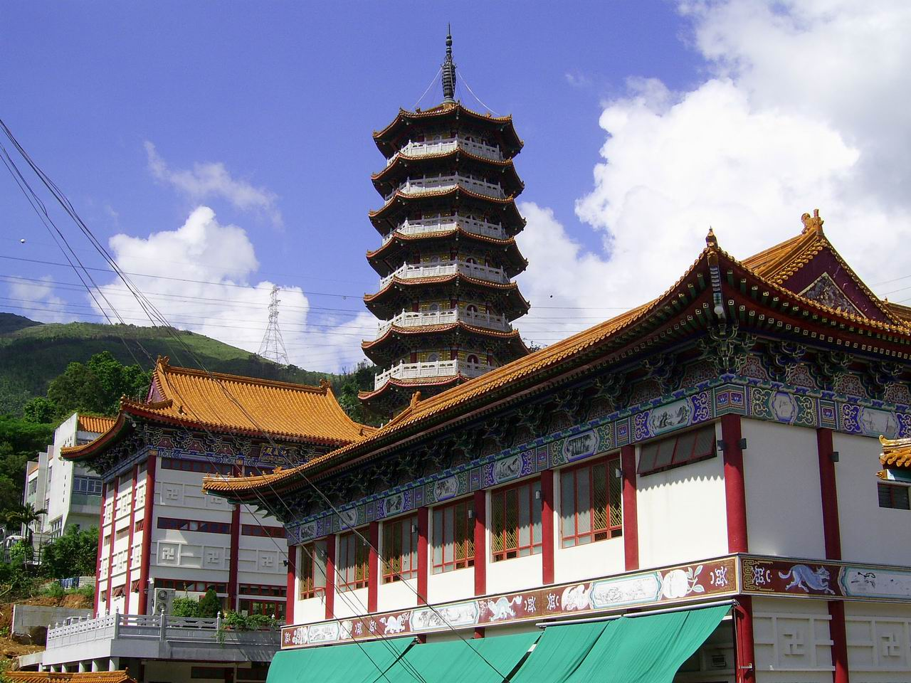 中文（香港）: 西方寺